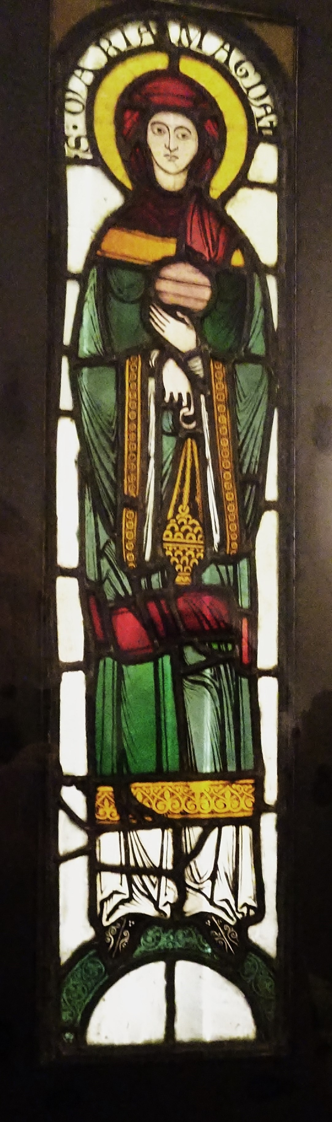 Die Darstellung der hl. Magdalena gilt als die älteste Glasmalerei in Österreich (um 1170)